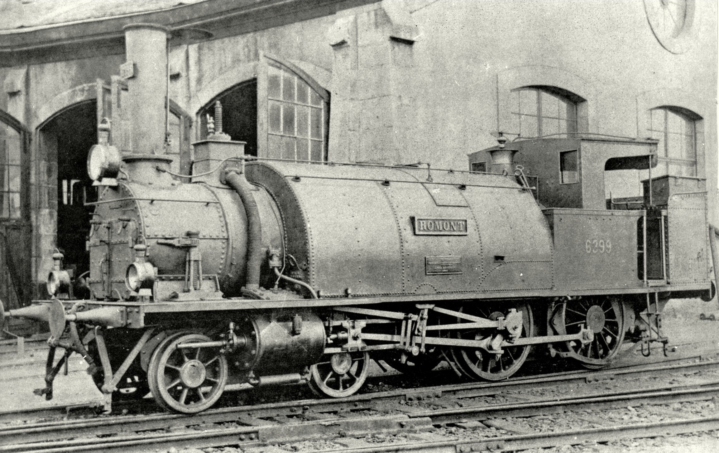 Tenderlokomotive Nr. 4 „Romont“ von 1862 Ec 2/4 der Lausanne–Freiburg–Bern-Bahn (LFB) für gemischten Dienst mit Satteltank für den Wasservorrat